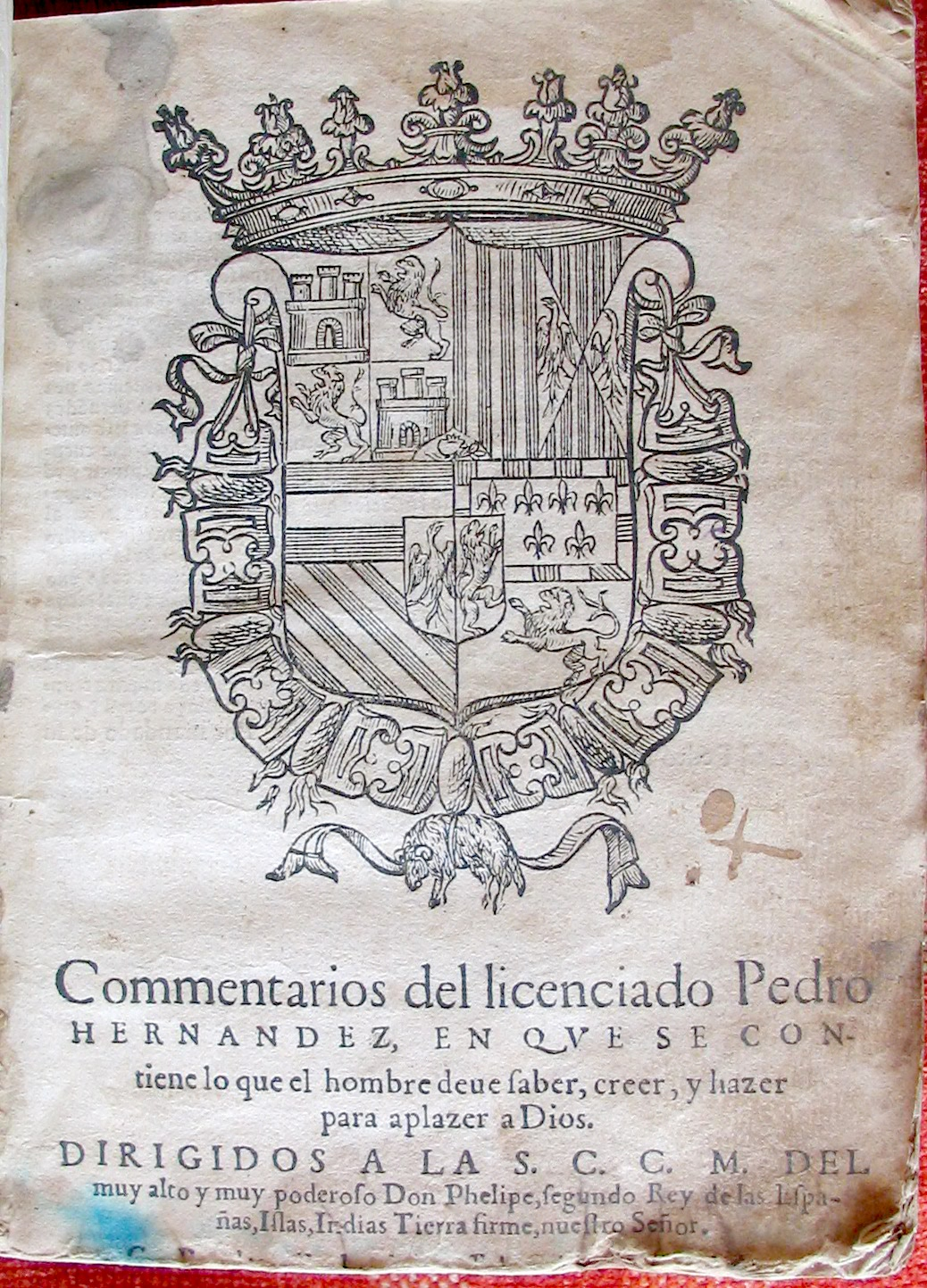 Comentarios del licenciado Pedro Hernández en que se contiene lo que el hombre deve saber, creer, y hazer para aplazer a Dios Valladolid, en casa de Sebastián Martínez, 1566.